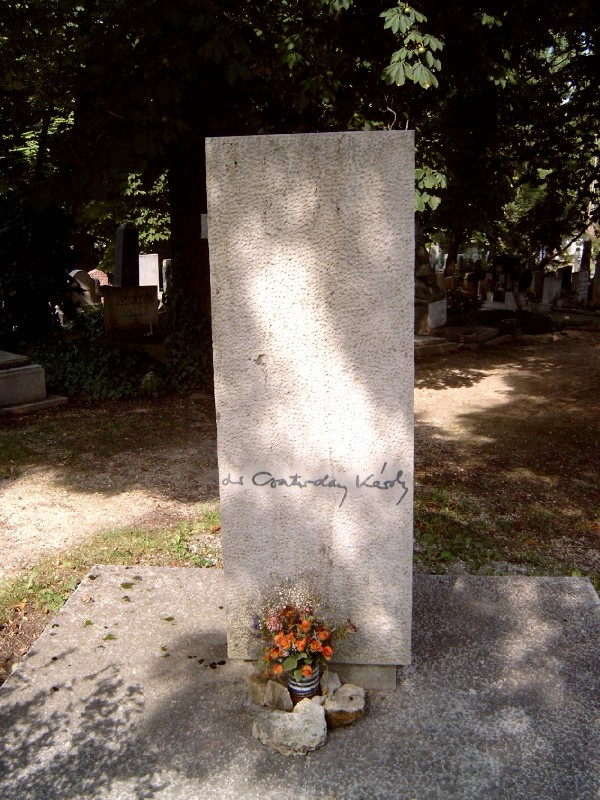 Csatordai Károly (Budapest, 1926. július 3. – Budapest, 1972. július 23.) jogász, diplomata sírja Budapesten. Farkasréti temető: 1-1-373/374